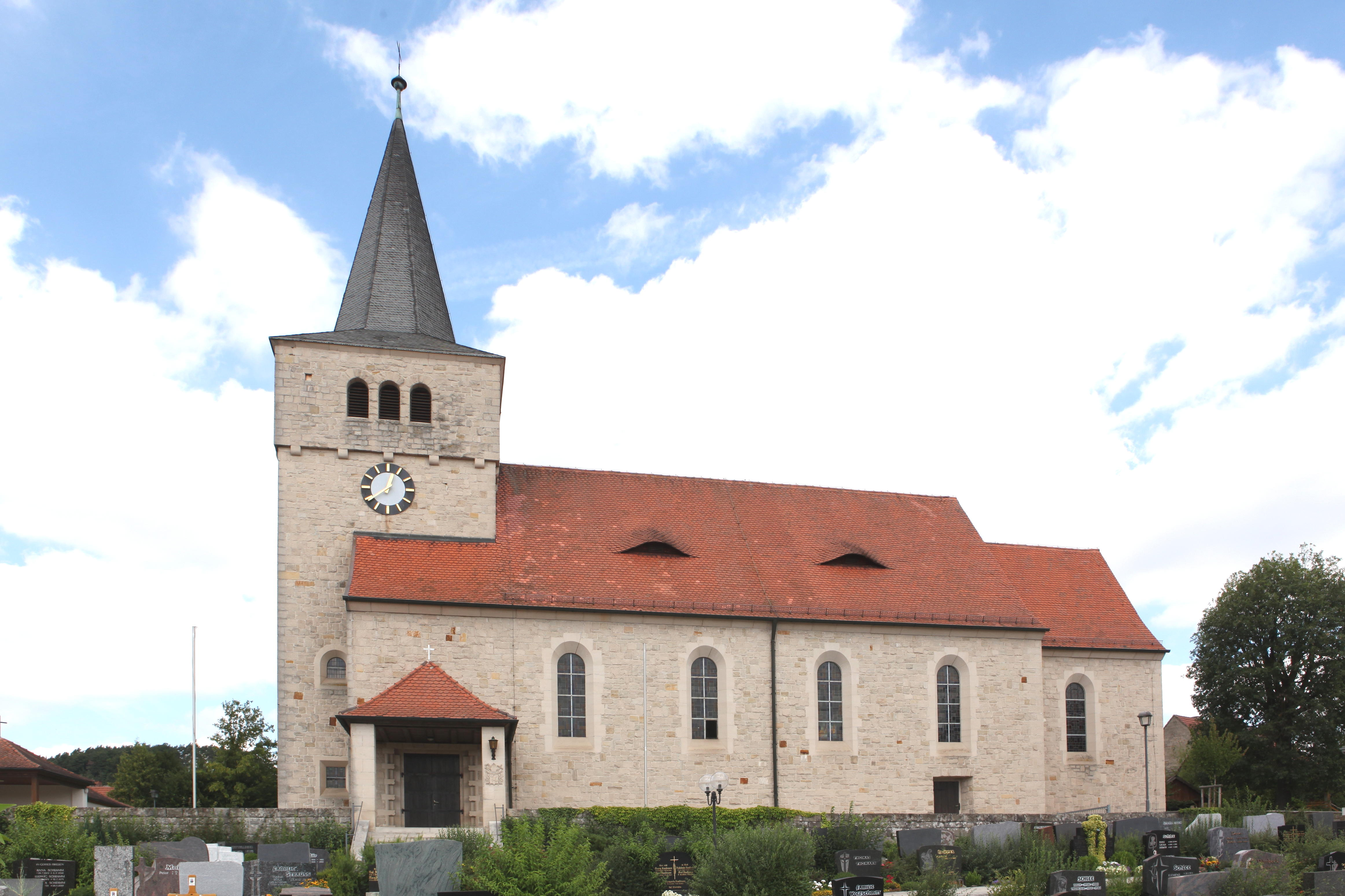 Kath. Pfarrkirche St. Matthäus in Breitbrunn